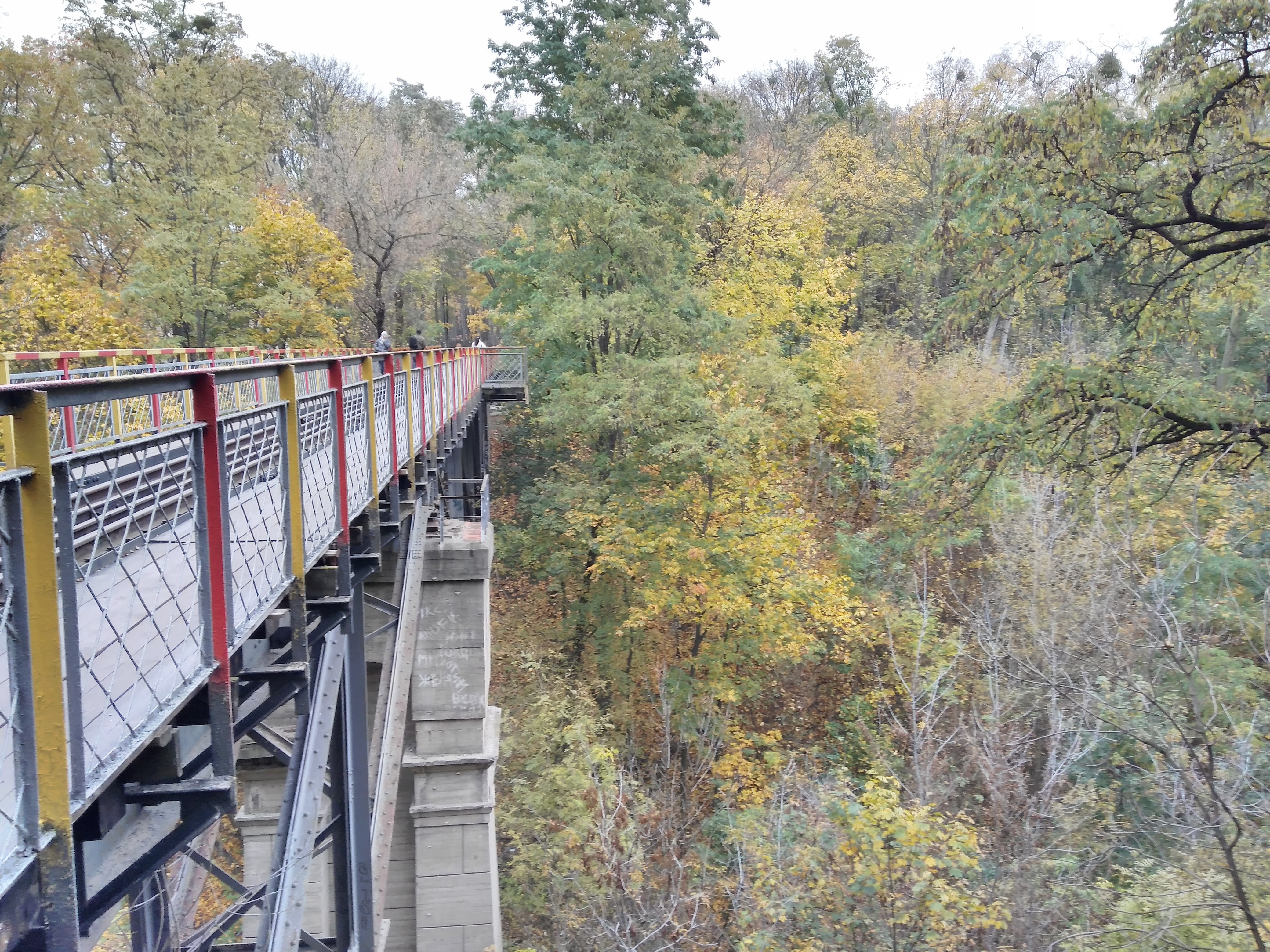 Київська дитяча залізниця, міст, Сирецький парк